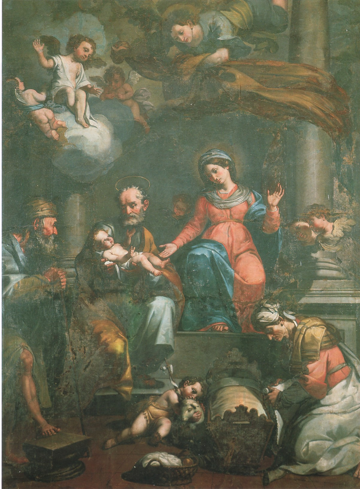 Anonimo, Sacra Famiglia.